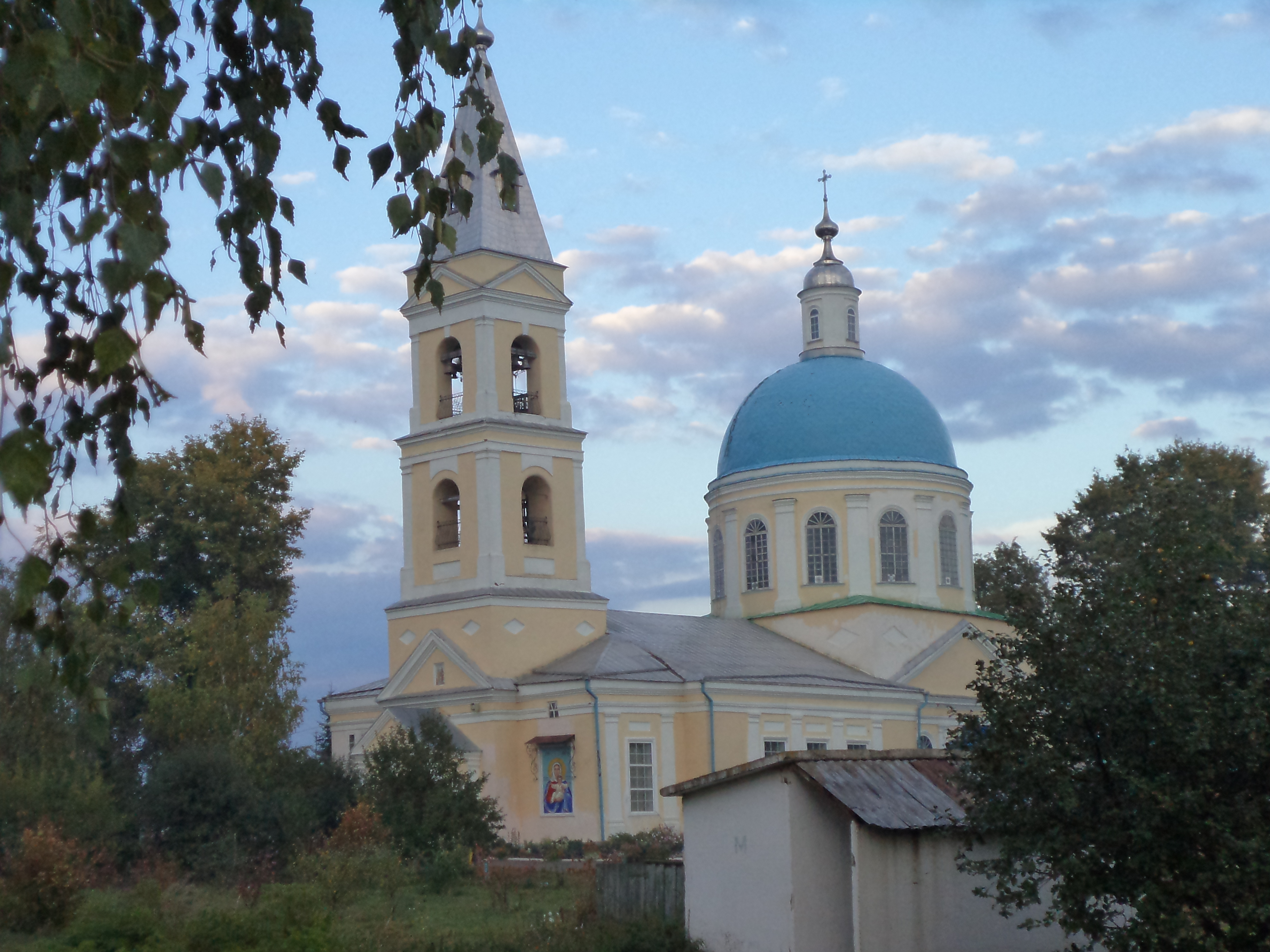 Петропавловская церковь (Республика Башкортостан, Нефтекамск, посёлок касево, тракторная улица)